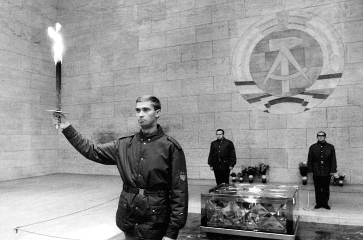 Zentralbild-Koard-30.9.70-Berlin: Festivalflamme nach Dresden-Eine Flamme vom ewigen Feuer des Mahnmals für die Opfer des Faschismus und Militarismus in Berlin trat am 30.9.70 von der DDR-Hauptstadt aus ihre Reise in die Stadt des Deutsch-Sowjetischen Jugendfestival Dresden an. Das Feuer des Berliner Mahnmals wird in Dresden mit dem vom Grabmal des unbekannten Soldaten in Moskau zur grossen Flamme der Völkerfreundschaft vereinigt.